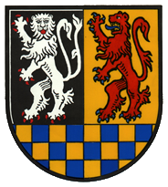 Das dreigeteilte Wappen von Zotzenheim zeigt in der oberen Hälfte 2 Löwen, dabei handelt es sich um die Wappen der Rheingrafen und der Wildgrafen, die zeitweise die Ortsherrschaft in Zotzenheim ausübten, bis der Ort spätestens im 14. Jahrhundert an Sponheim kam, deren Schach im Schildfuß erscheint. Zwischen 1223 und 1230 erfolgte die Aufteilung der Grafschaft Sponheim in hintere und vordere Grafschaft mit Sitz auf der Kautzenburg.